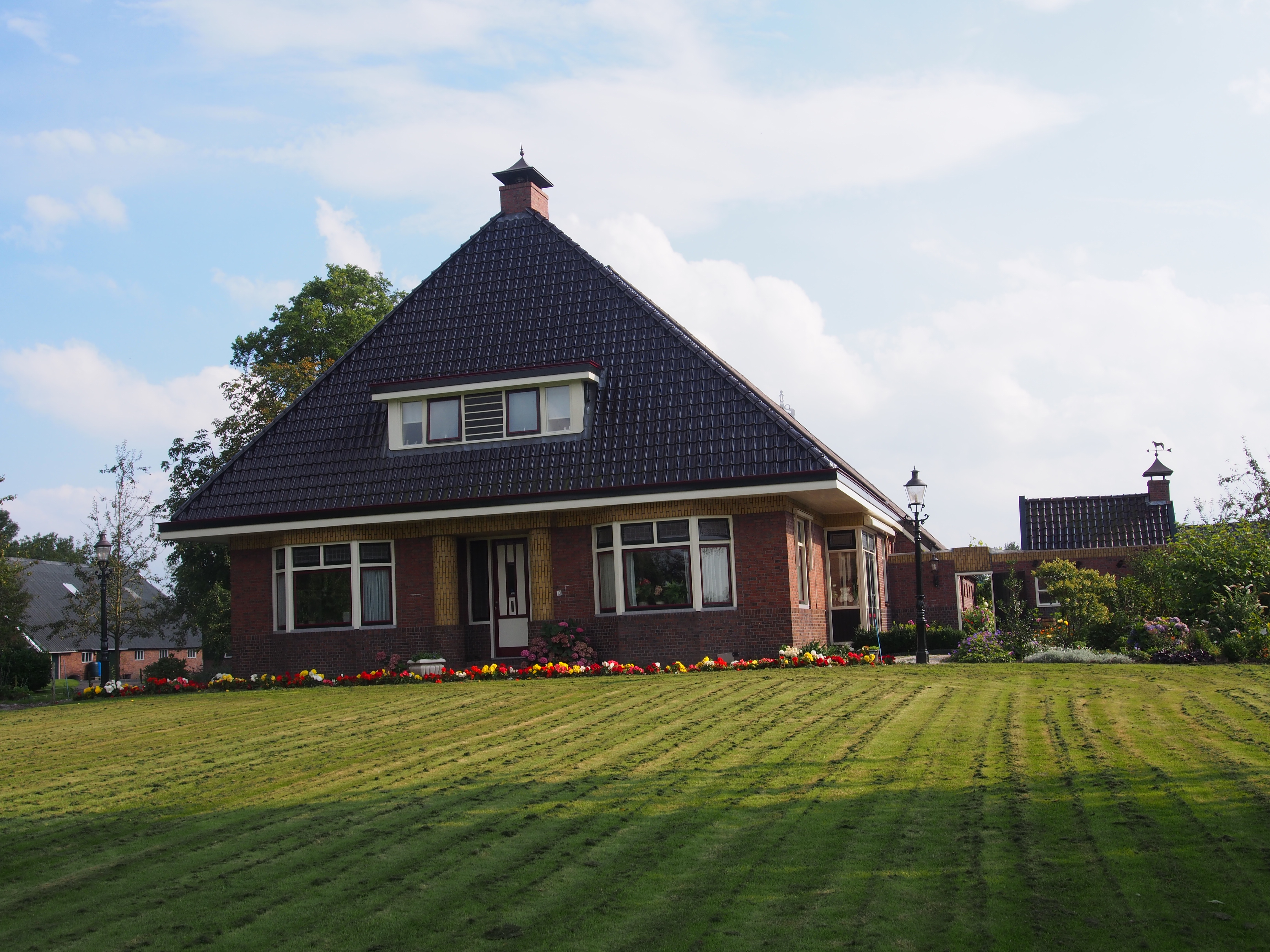 Stolpboerderij, Hoofdstraat 13, Grootegast